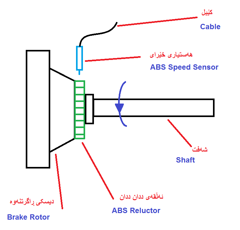 کوردی: درووست کردنی وێنەیەک بۆ ڕوون کردنەوەی کارکردنی ABS